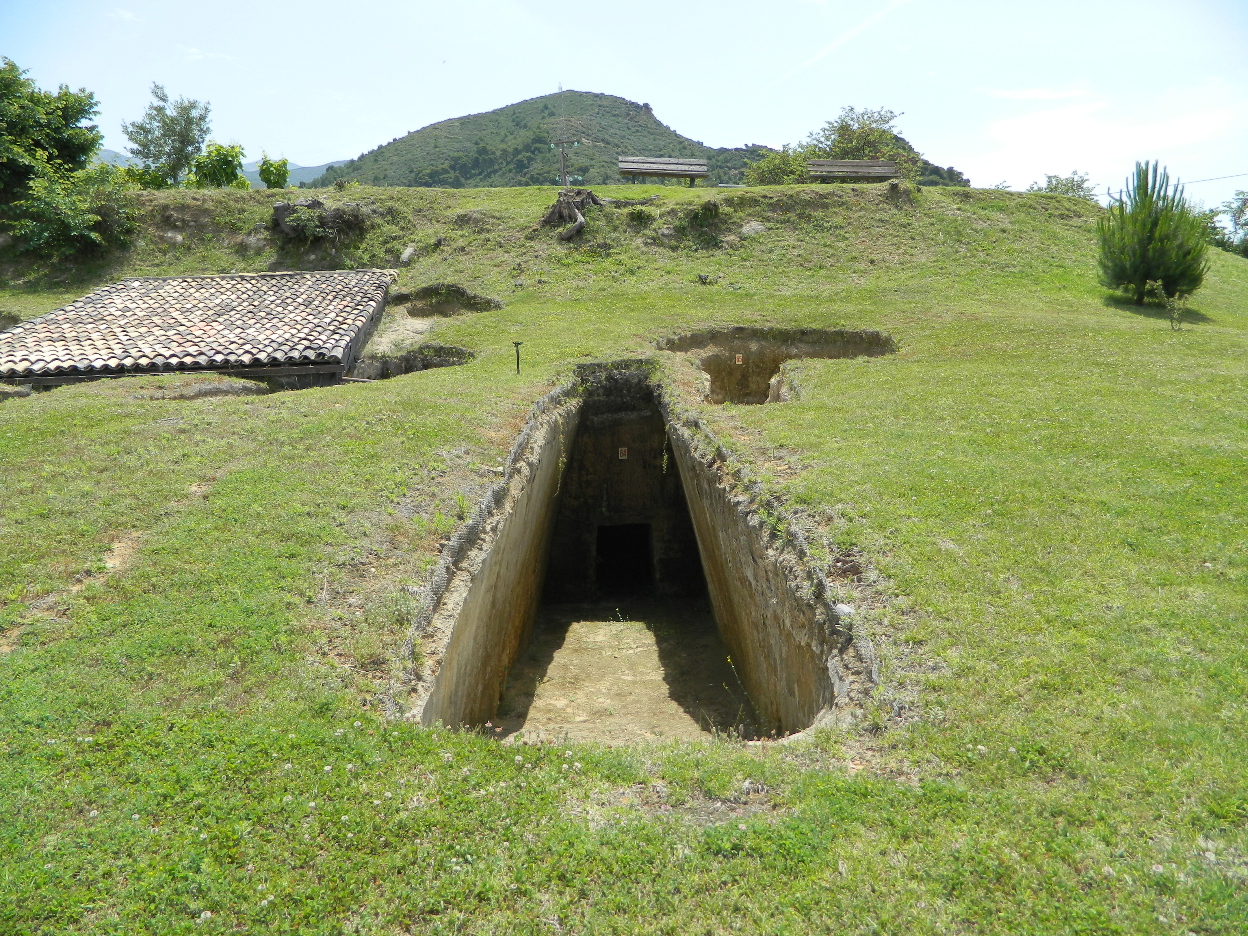 «Βούντενη»